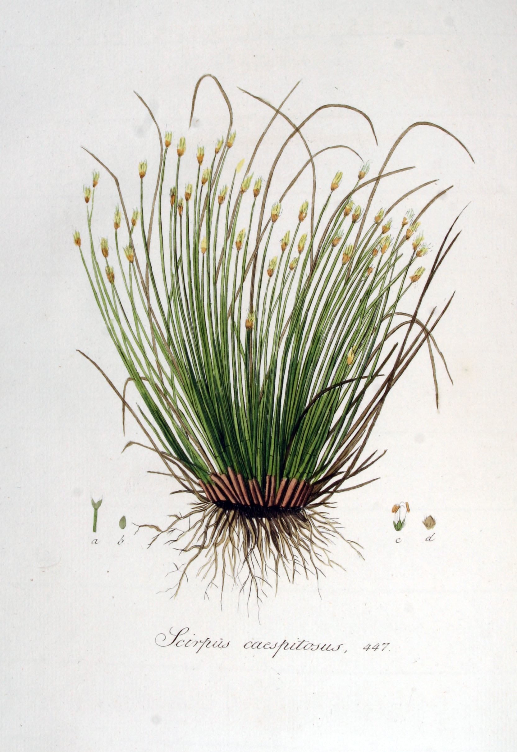 Trichophorum cespitosum (L.) Hartm. (Syn. Scirpus cespitosus L.)